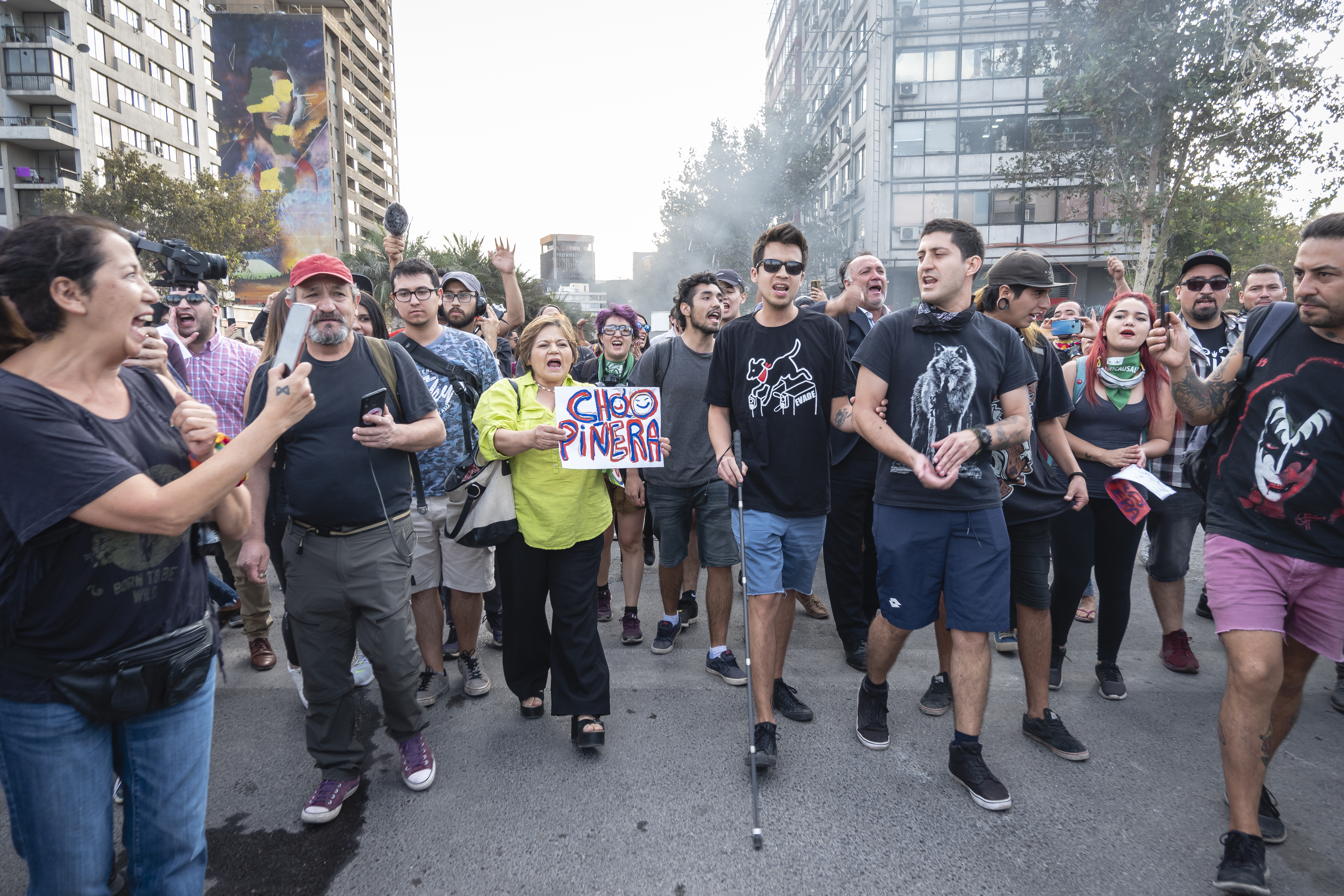 Emotivo recibimiento a Gustavo Gatica en la Plaza de la Baquedano.